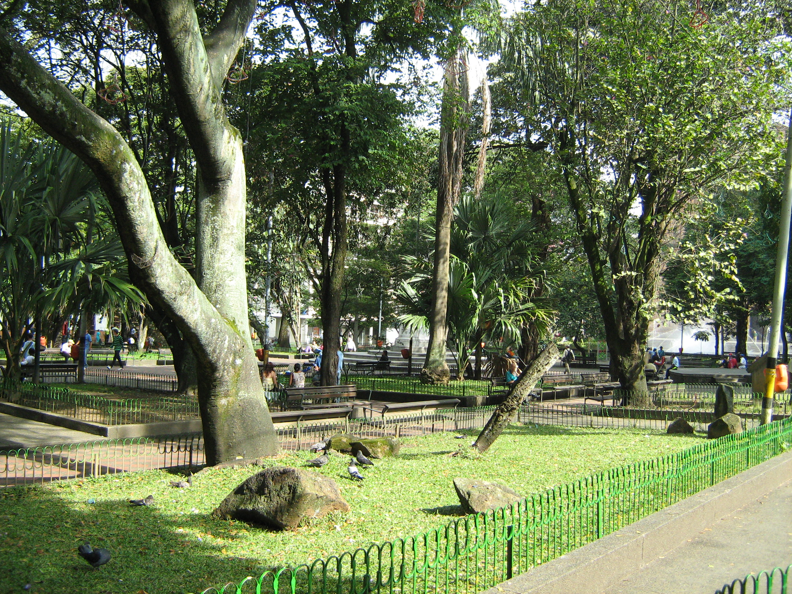 vista del Parque de Bolivar. Medellín, Colombia